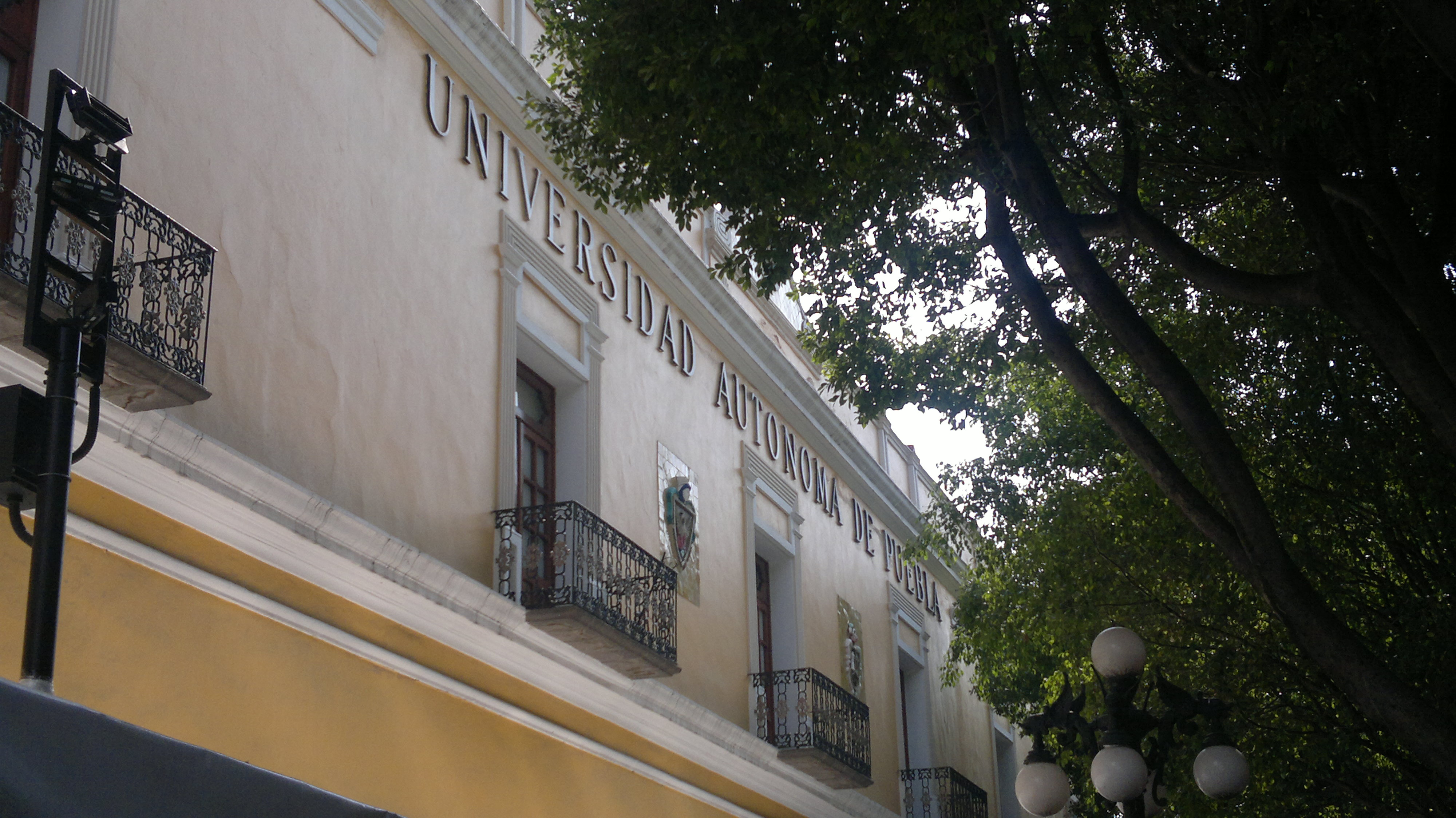 Detalle de fachada del Edificio Carolino en la ciudad de Puebla, Puebla, México